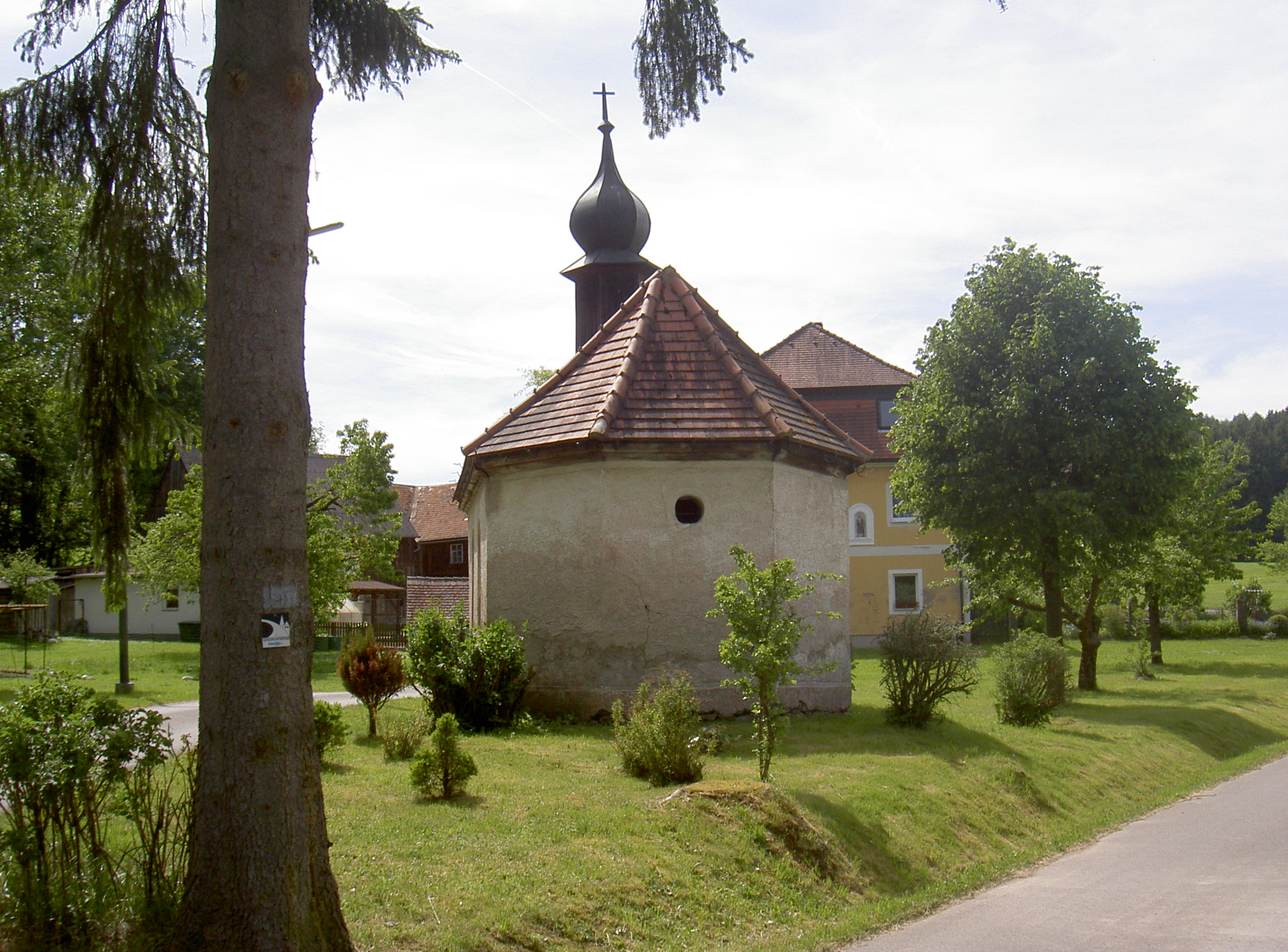 Kapelle beim Hammerhaus Waltenrieth